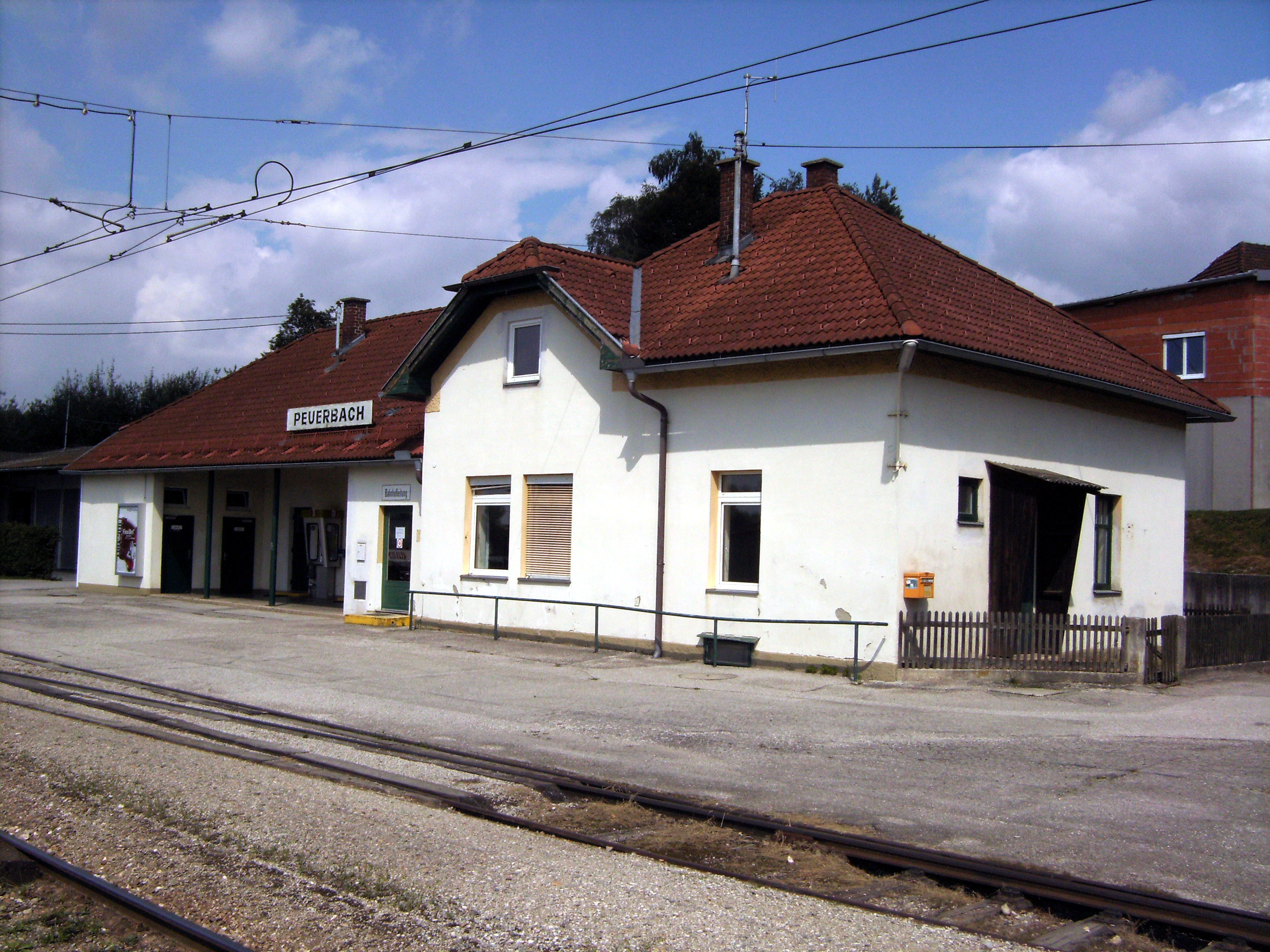 Bahnhof Peuerbach der Linzer Lokalbahn